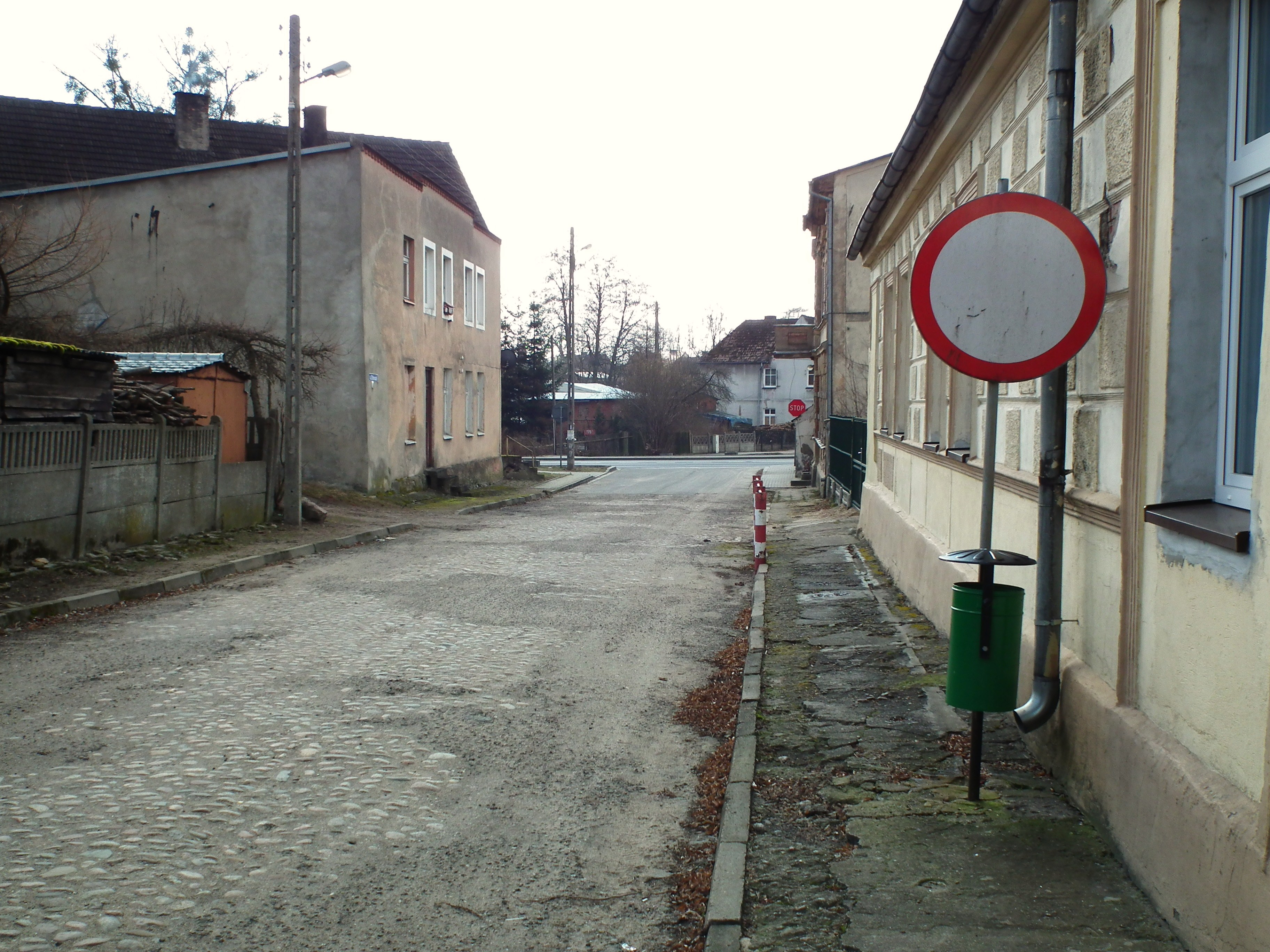 Krajobraz miejski z Lędyczka.